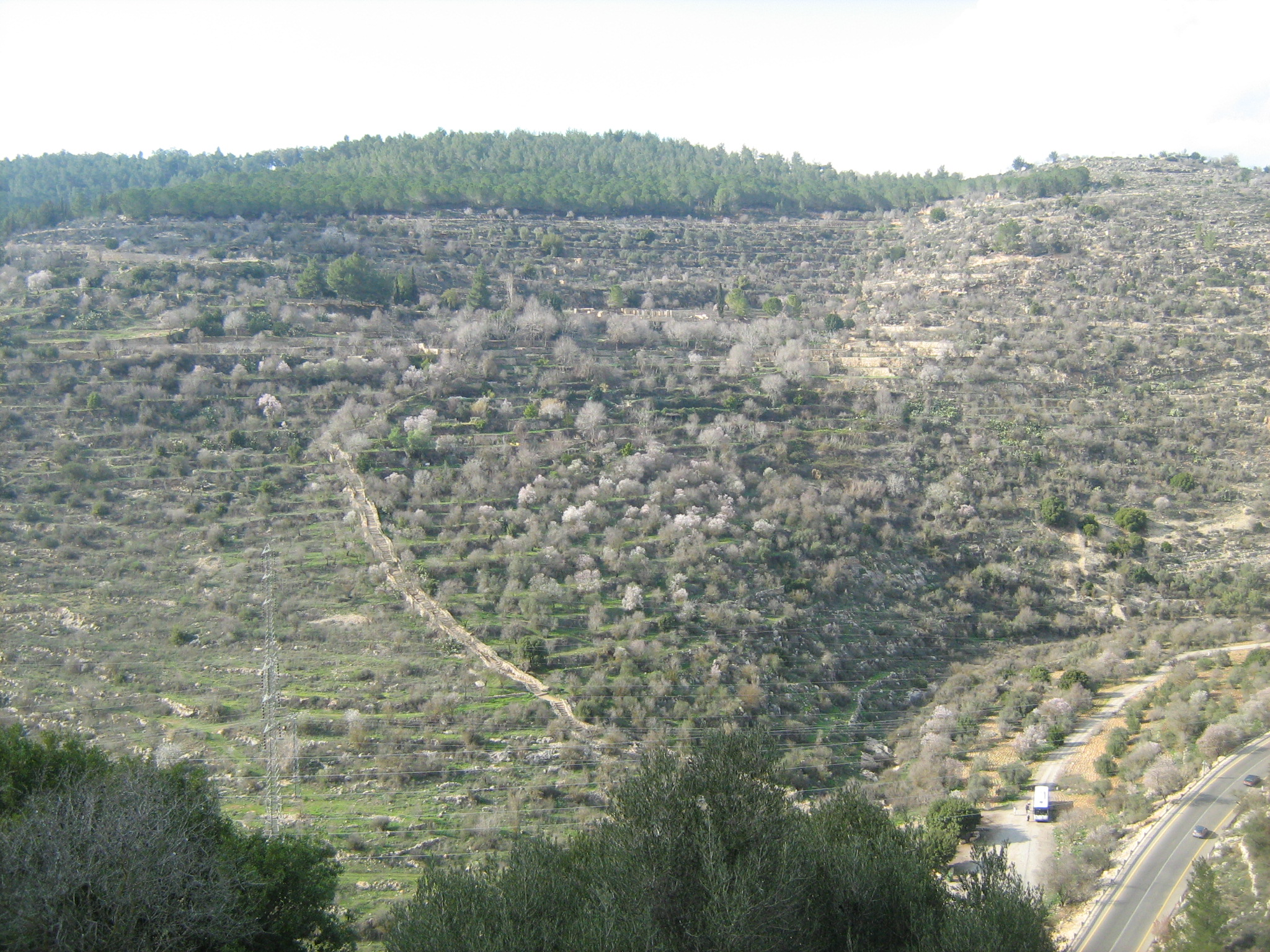 הסטף ממנזר יוחנן במדבר